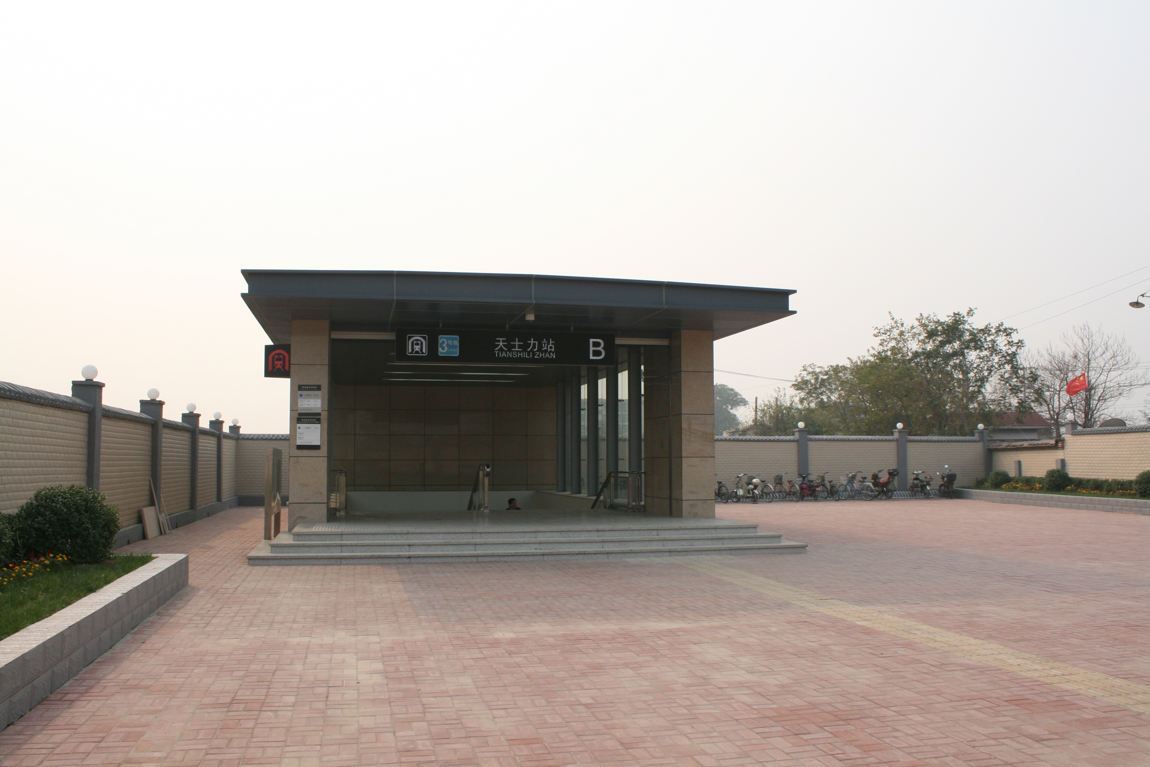 天津地鐵三號線天士力站B出口